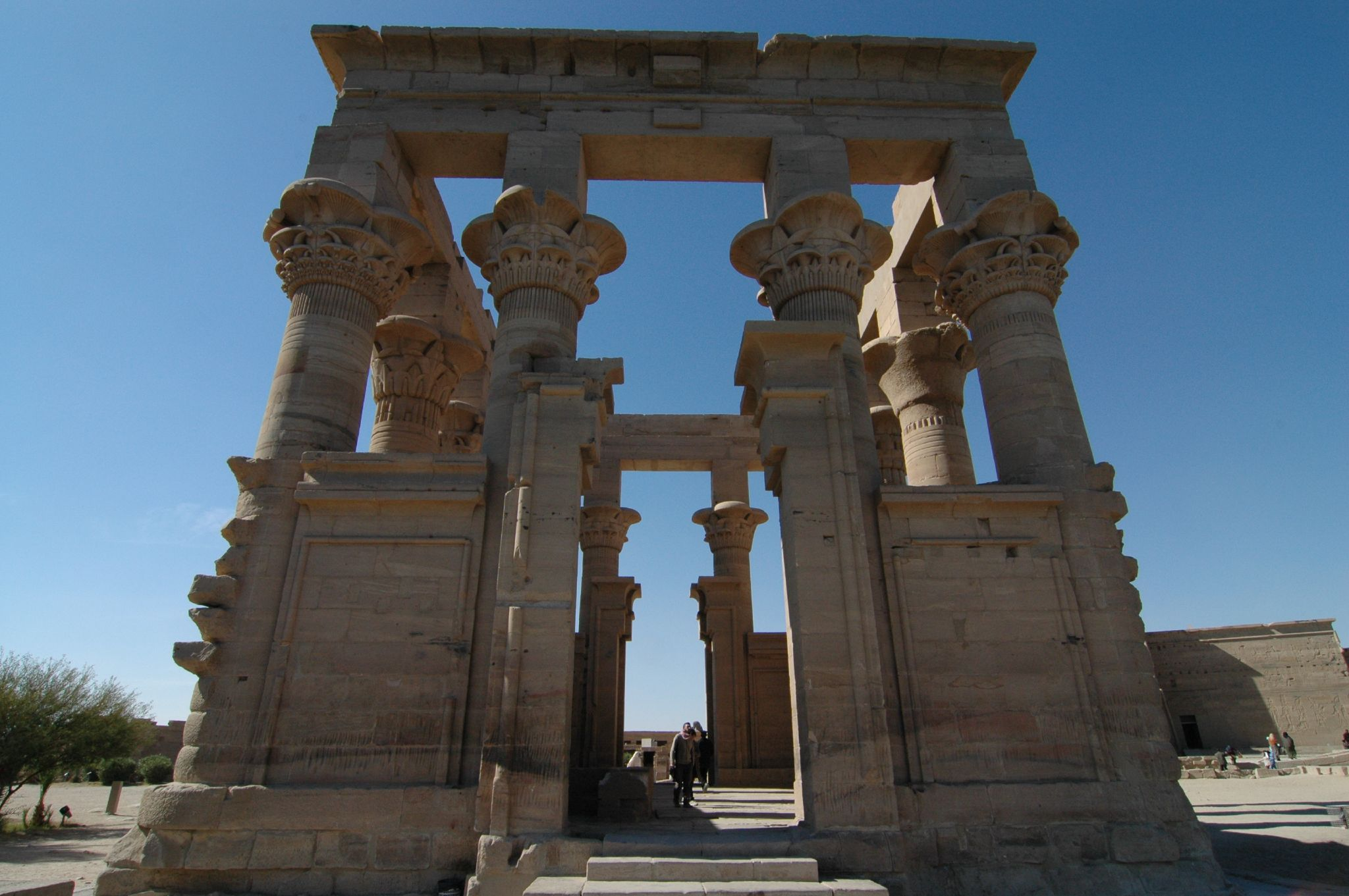 File: Padiglione di Traiano